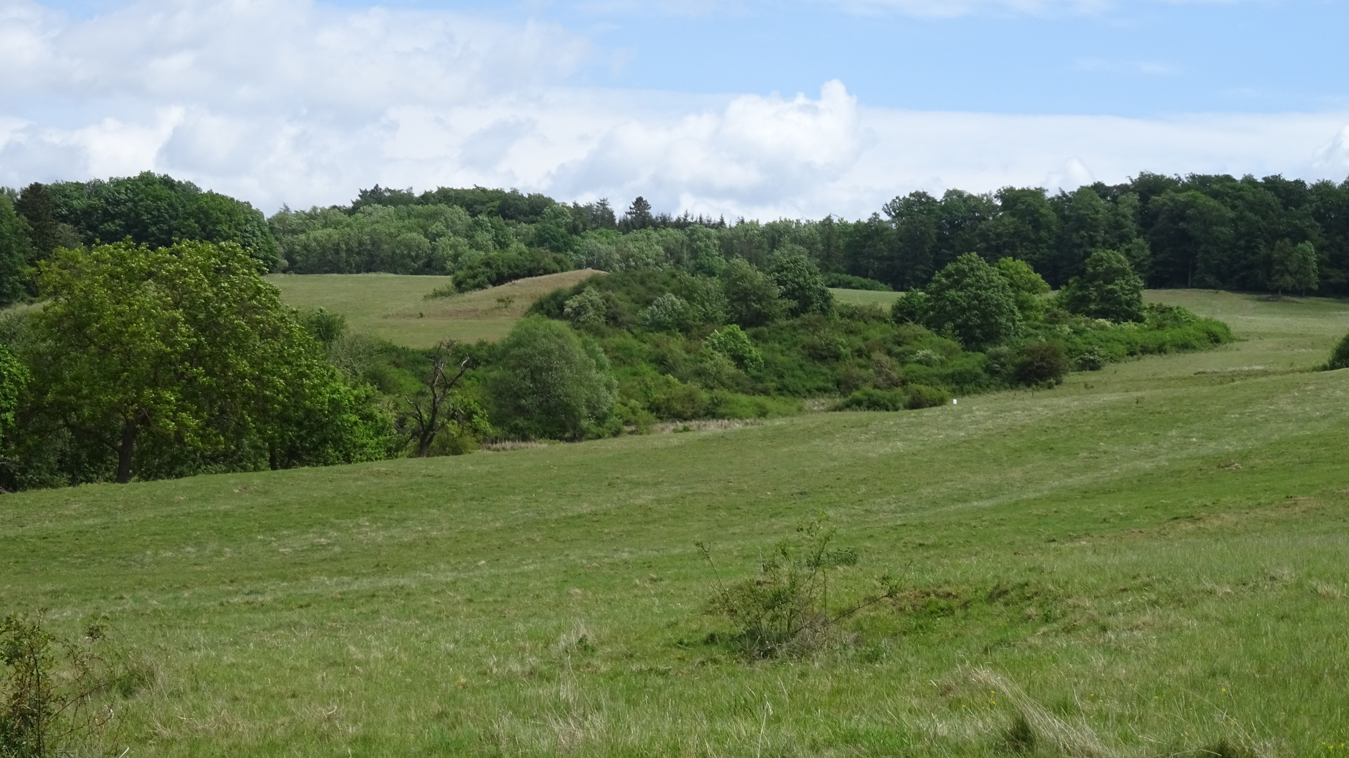 Blick von früheren Dörnishöfen